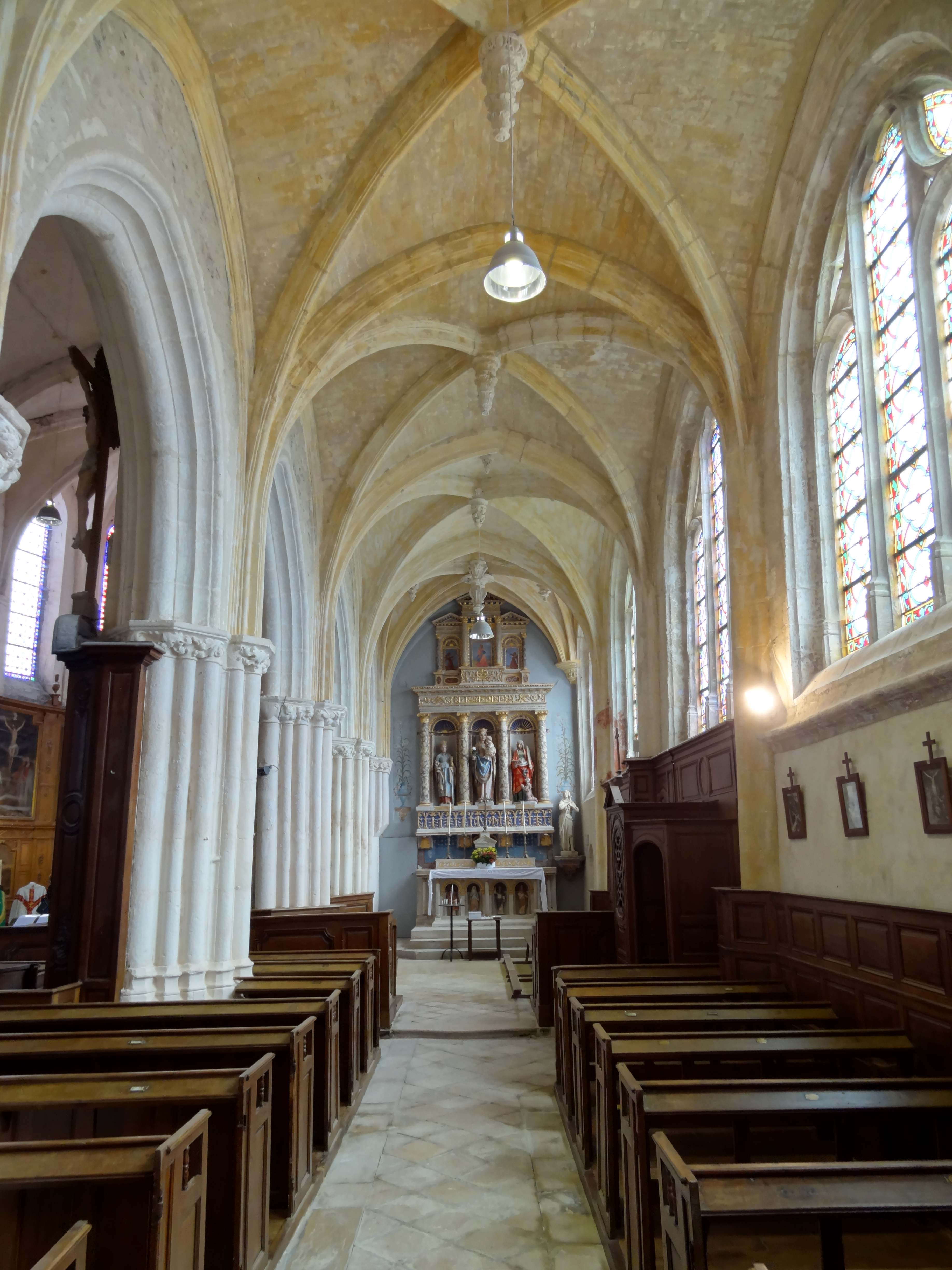 Intérieur de l'église - voir titre.